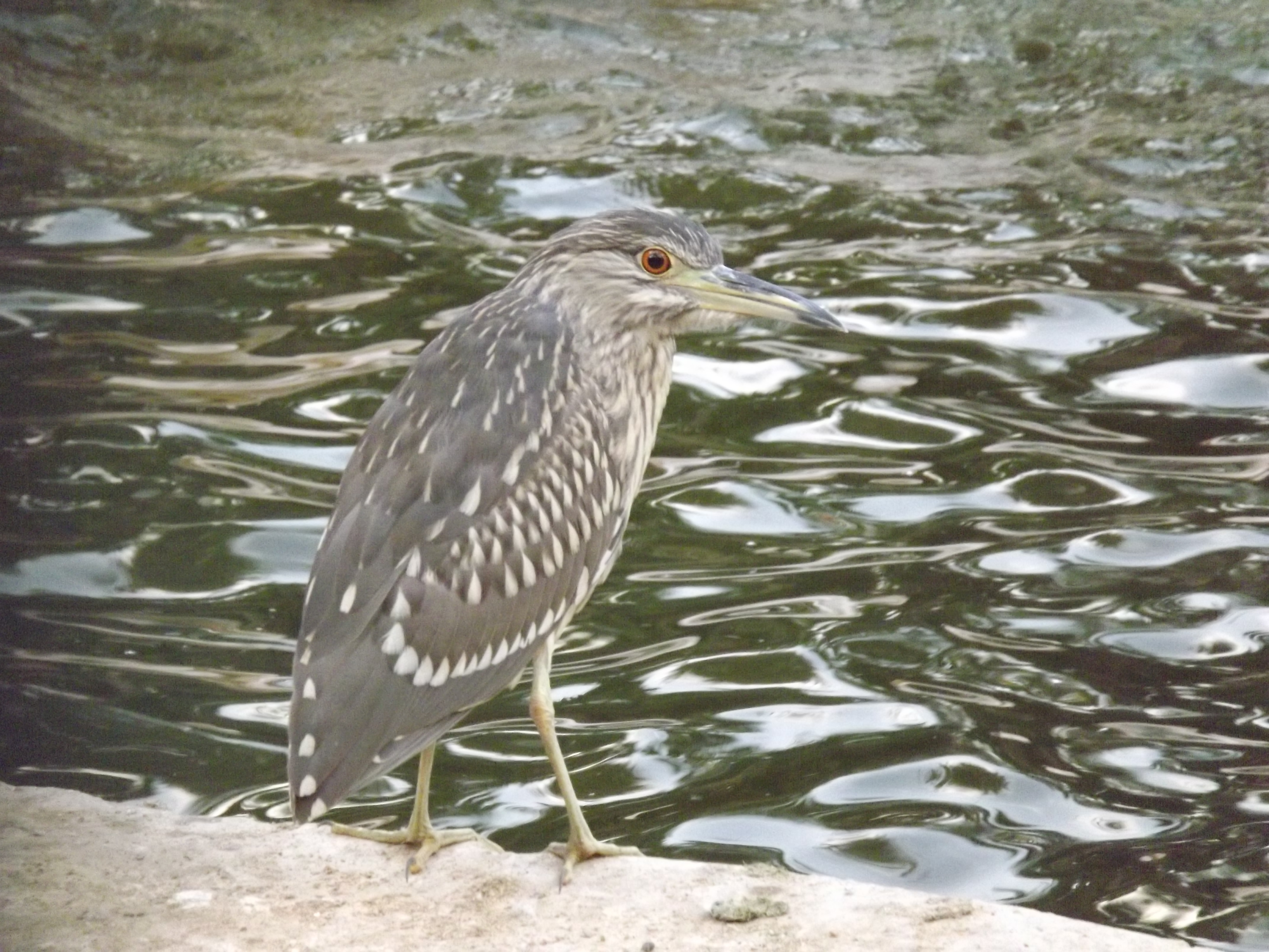 بلشون الليل في حديقة حيوان الجيزة